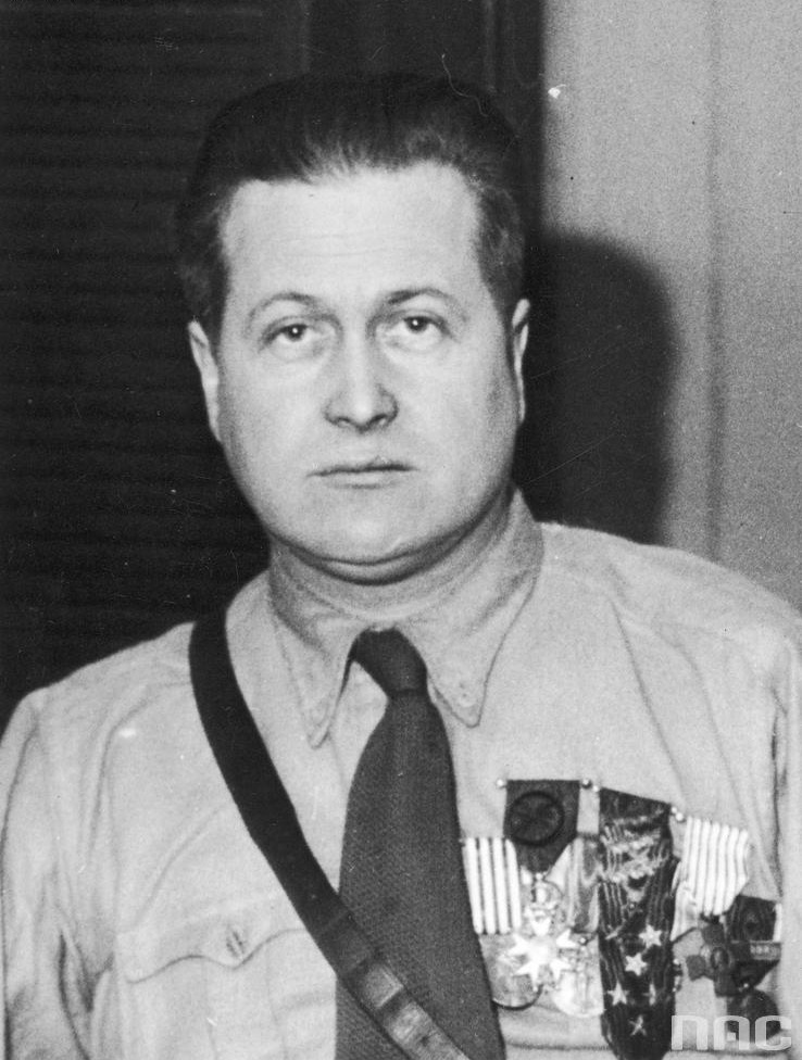 Marcel Bucard, nacjonalistyczny i faszystowski francuski działacz polityczny - fotografia portretowa.